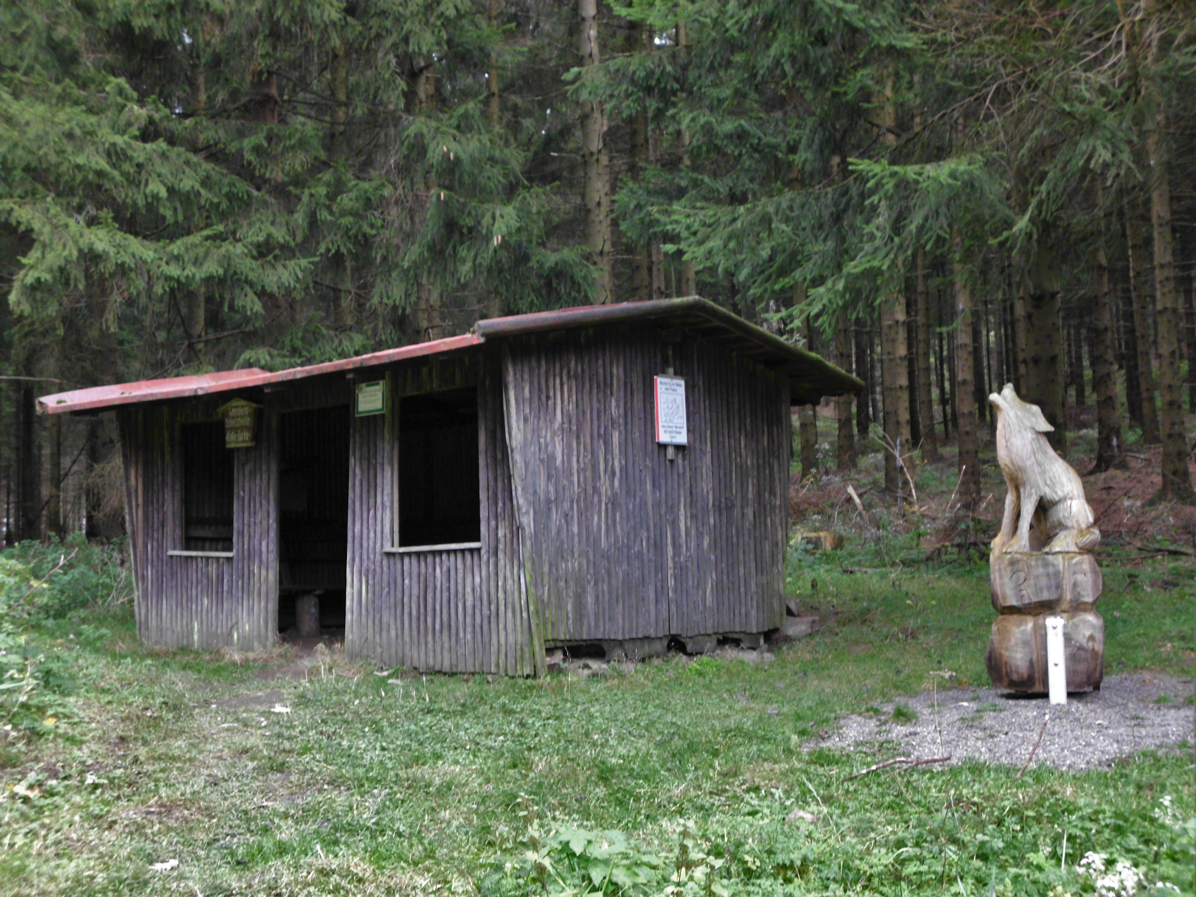 Kalte Birke im Nordwestharz südöstlich von Neuekrug